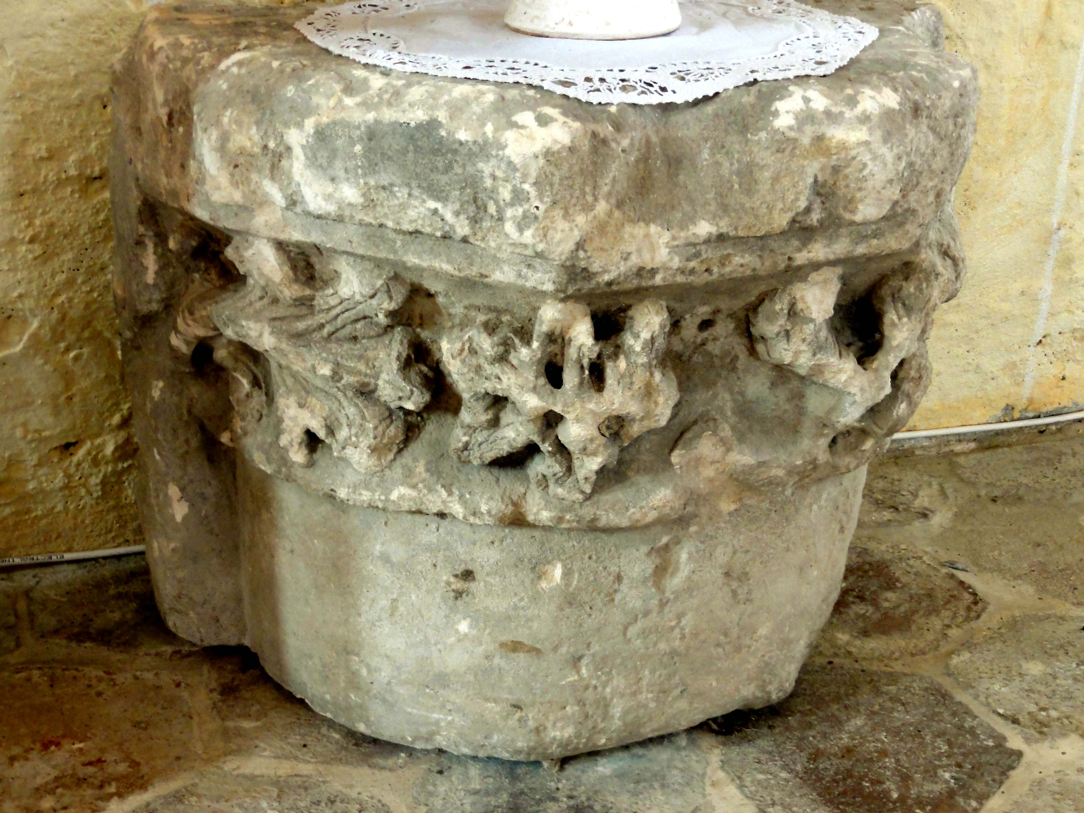 Bas-côté nord, chapiteau déposé, provenant du 2e ou du 4e doubleau.